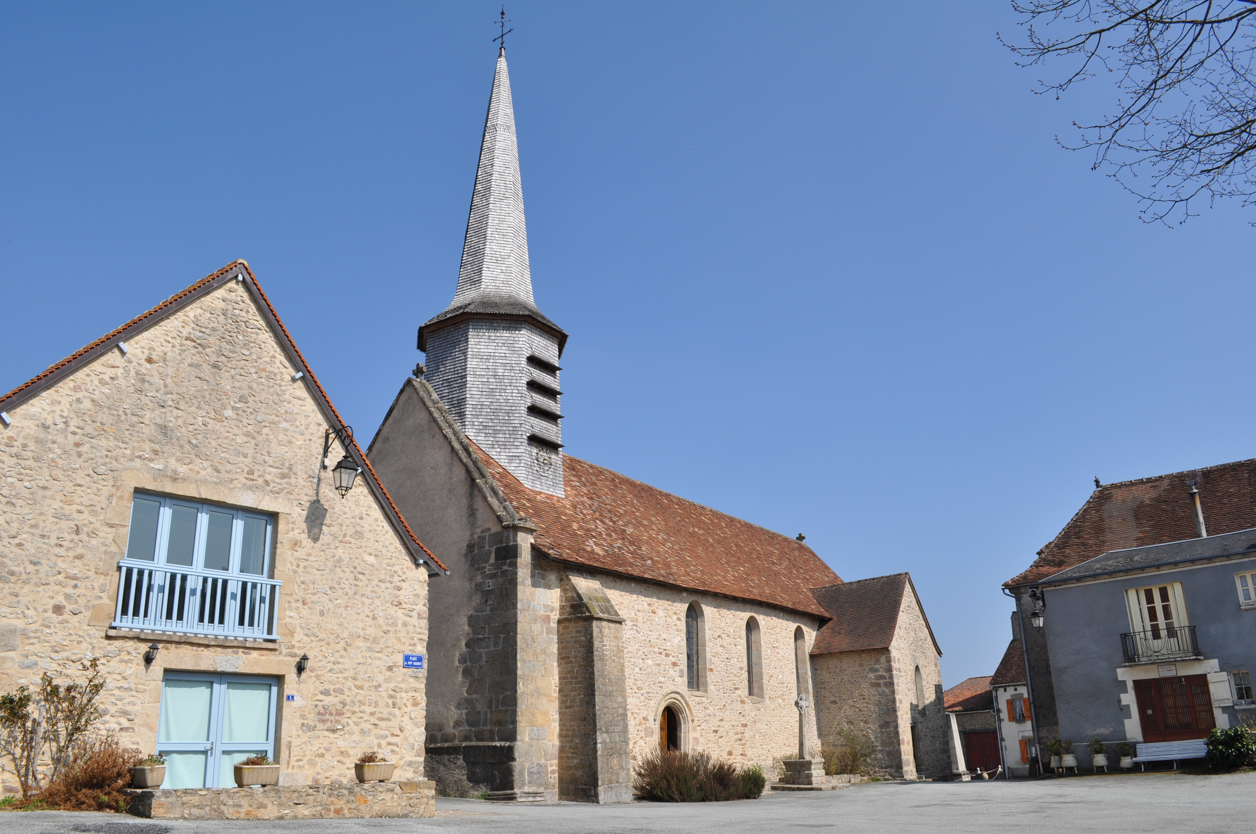 L'église de Dompierre-les-Églises